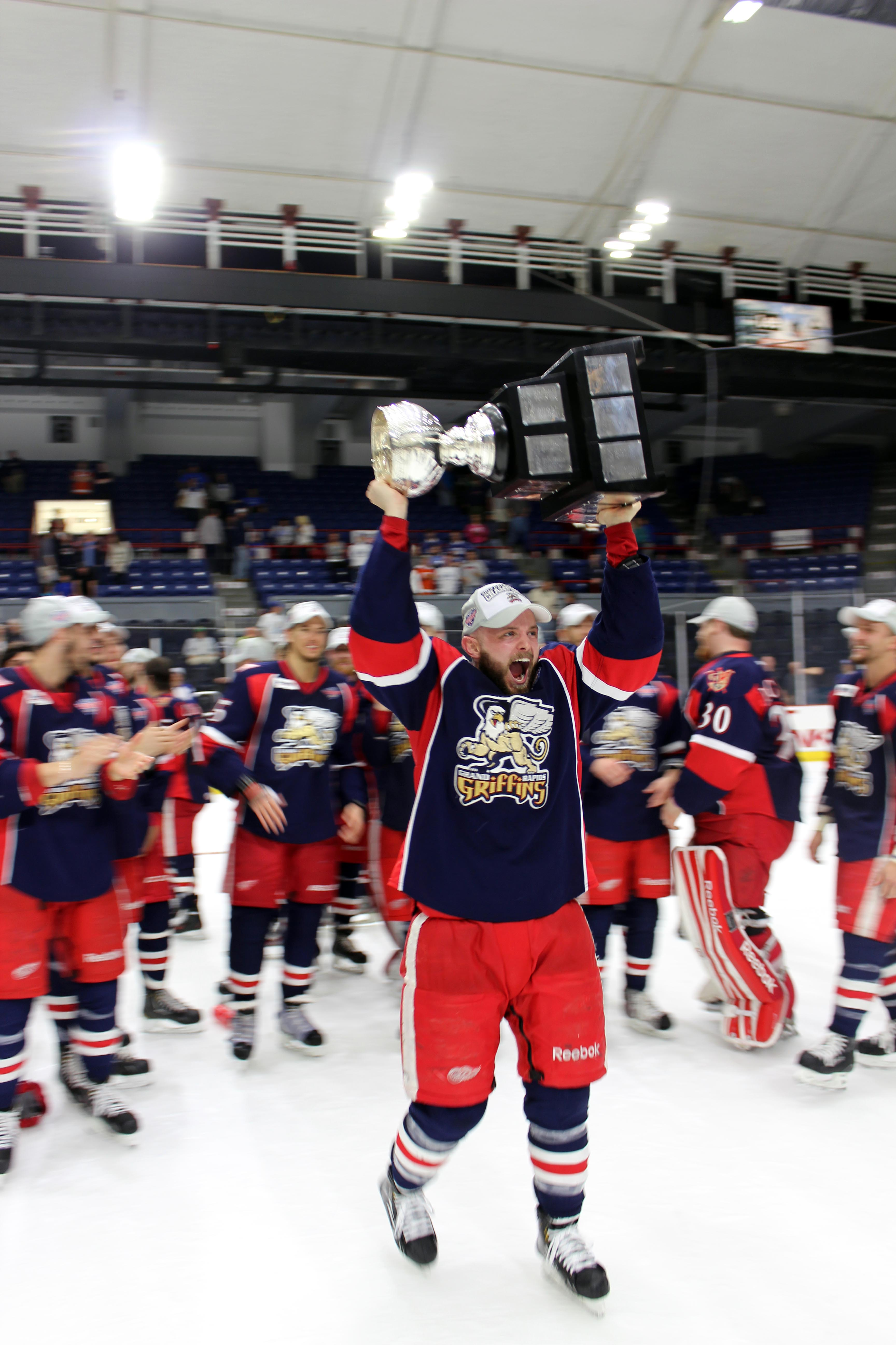 Photo: Sean Lavoine/AHL